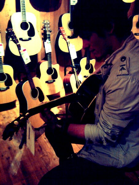 Brad Kavanagh em loja de guitarra